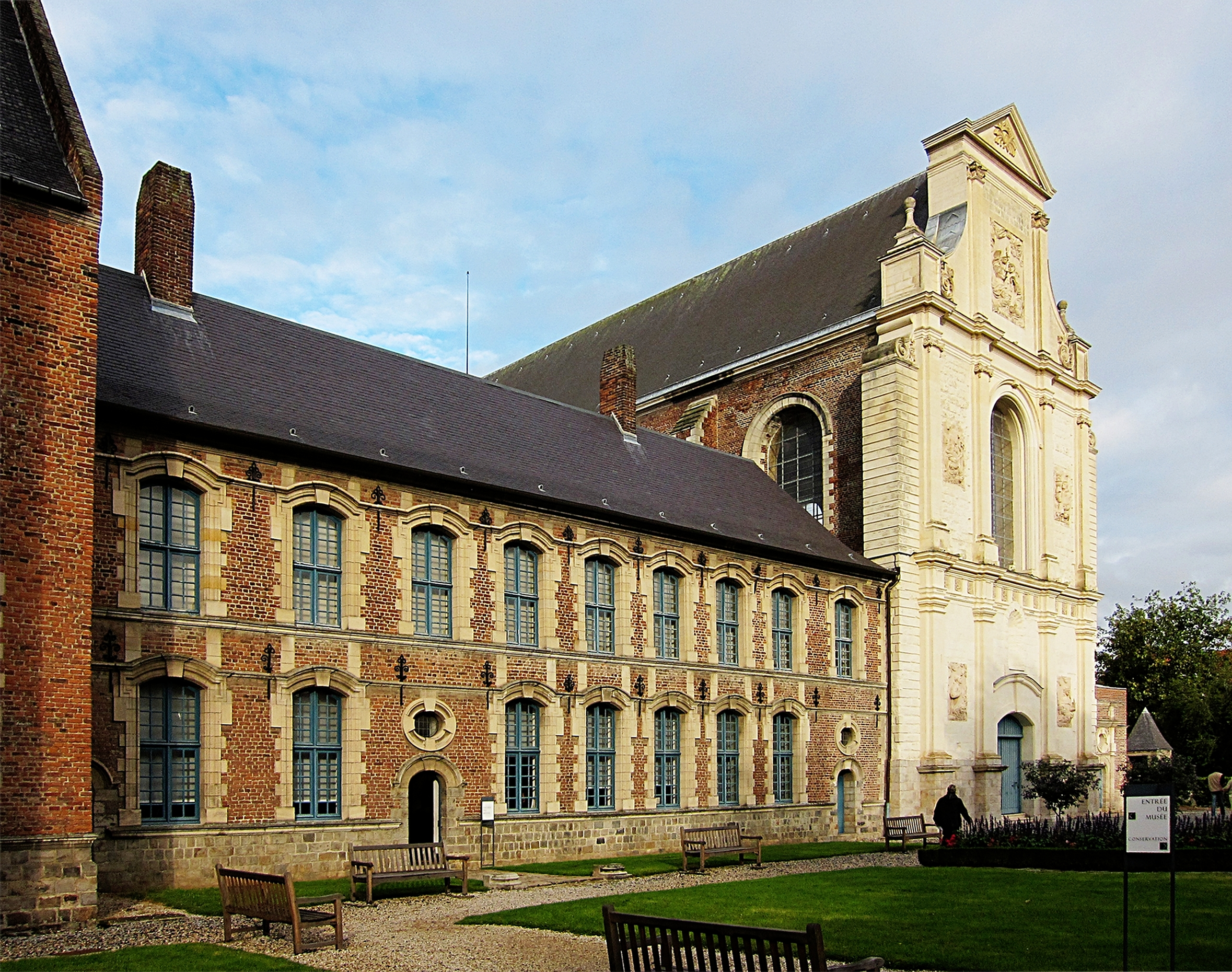 L'ancien couvent des Chartreux de Douai, aujourd'hui musée de la Chartreuse (musée des beaux-arts de Douai). .